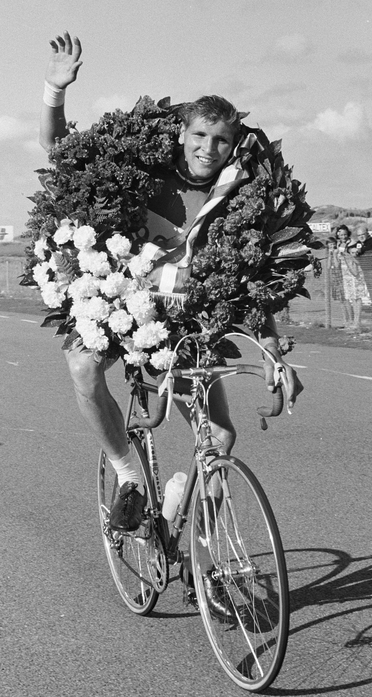 Wielrennen circuit op Zandvoort ( Cor Schuuring )